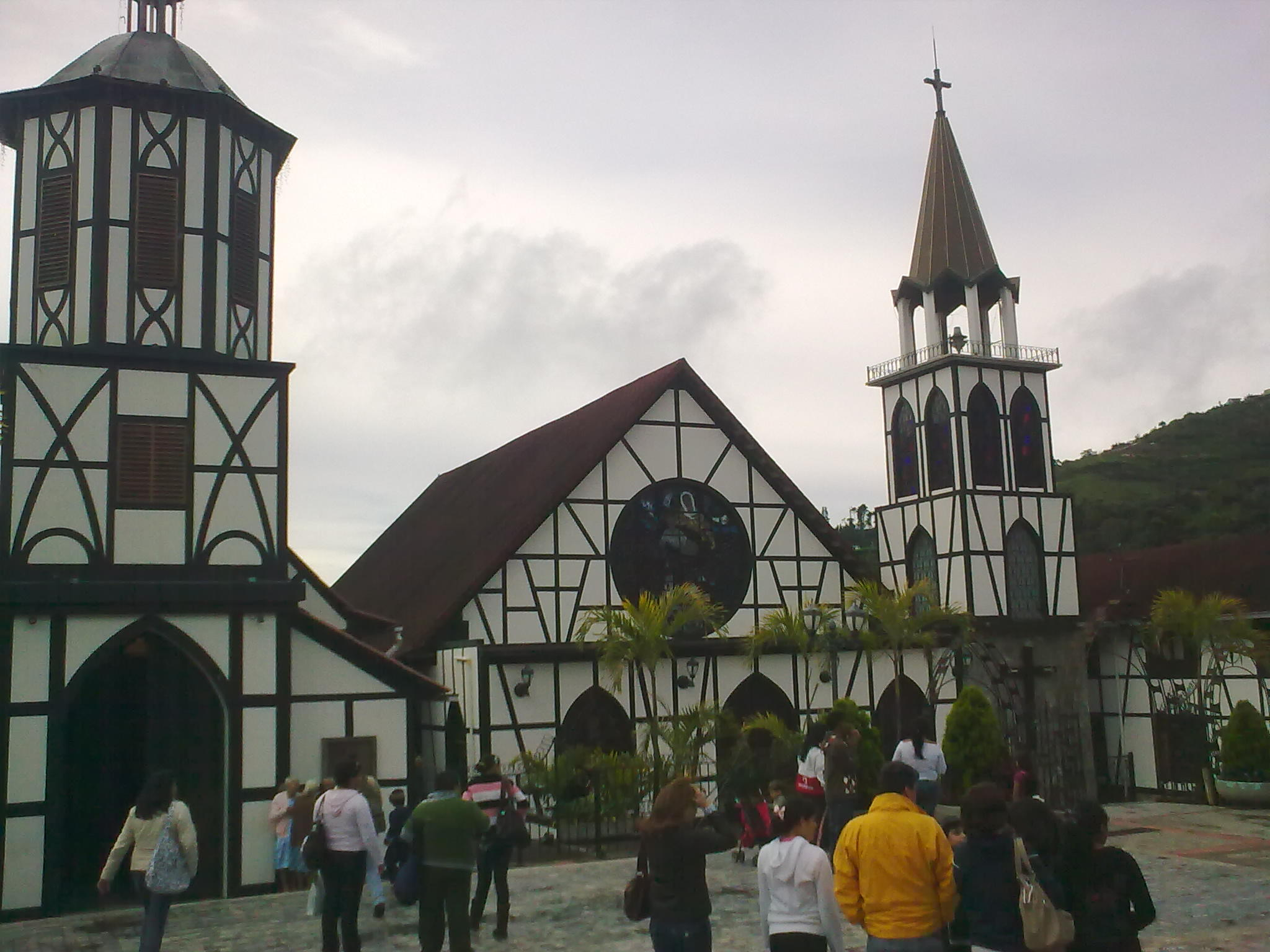 Iglesia de San Martin de Tours, Colonia Tovar, Venezuela.